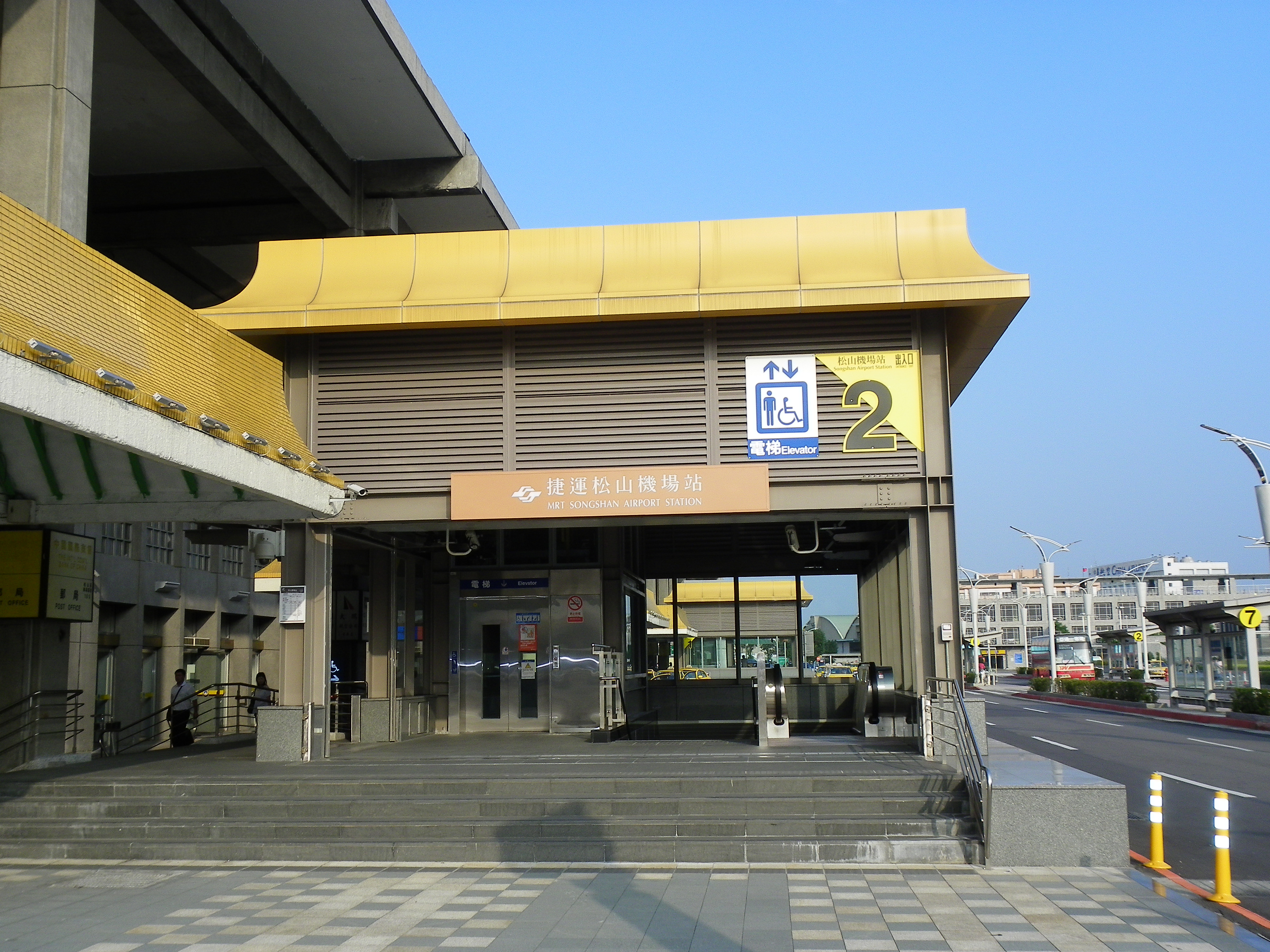 台北捷運内湖線松山機場駅の2号出口。